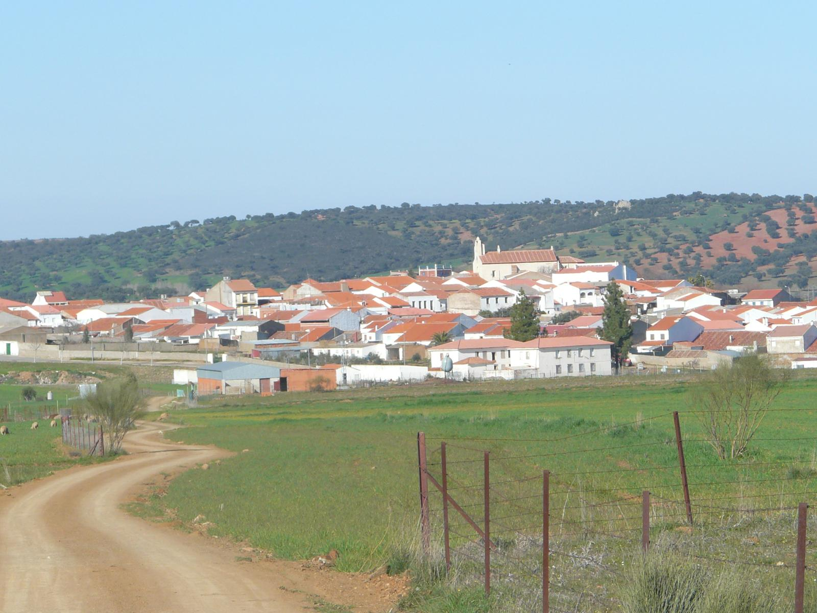 Vista de Retamal de Llerena